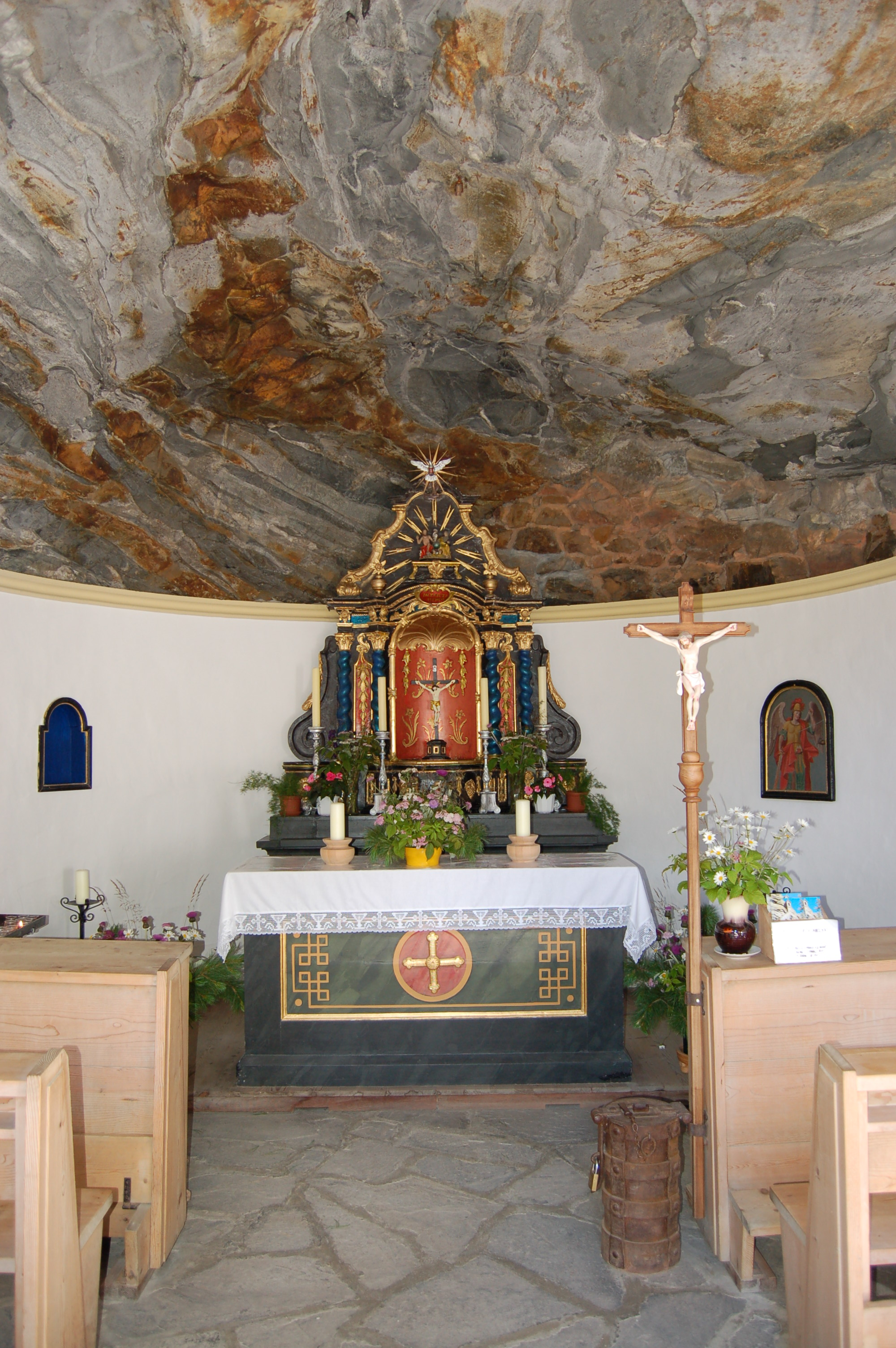 Die denkmalgeschützte Felsenkapelle im Gschlößtal (Gemeinde Matrei in Osttirol)